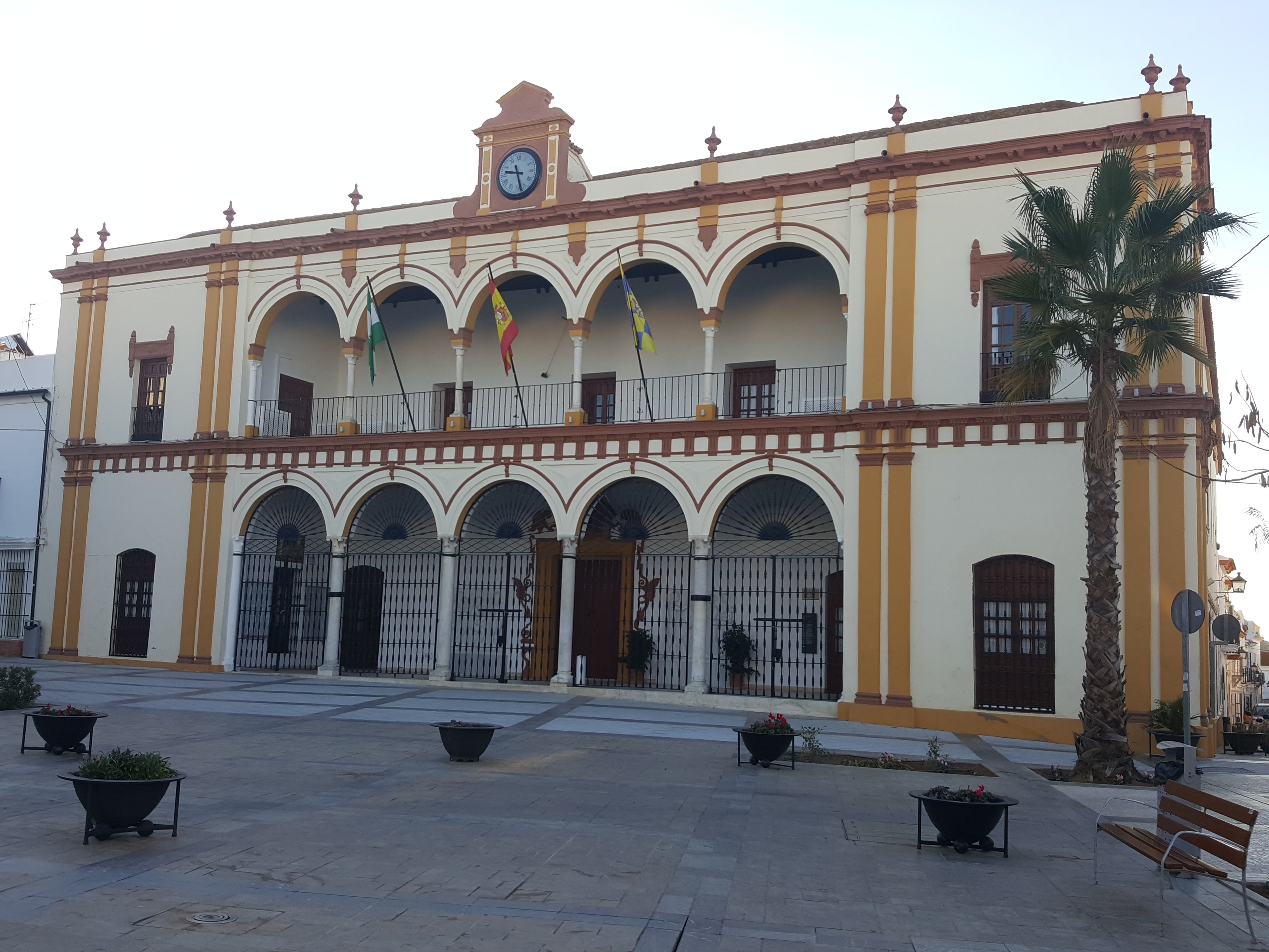 Fachada del Ayuntamiento de Moguer, Andalucía (España).